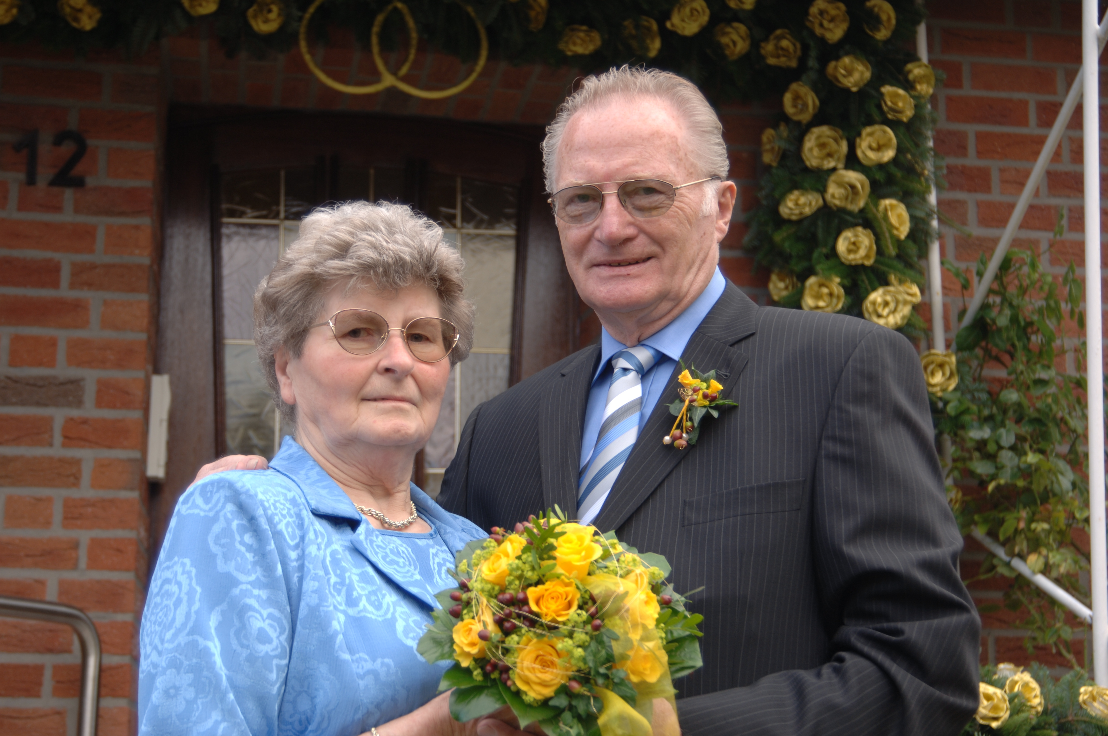 Luzia und Paul Nößler am Tag ihrer Goldenen Hochzeit am 13. August 2005 vor ihrem Haus in Recke-Steinbeck, Kreis Steinfurt, Nordrhein-Westfalen, Deutschland.